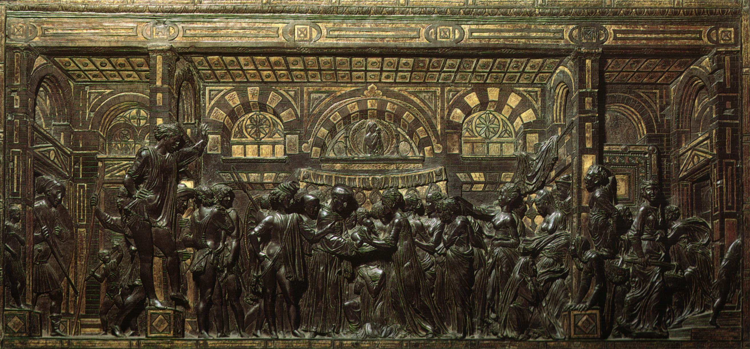 Donatello, miracolo del neonato che parla